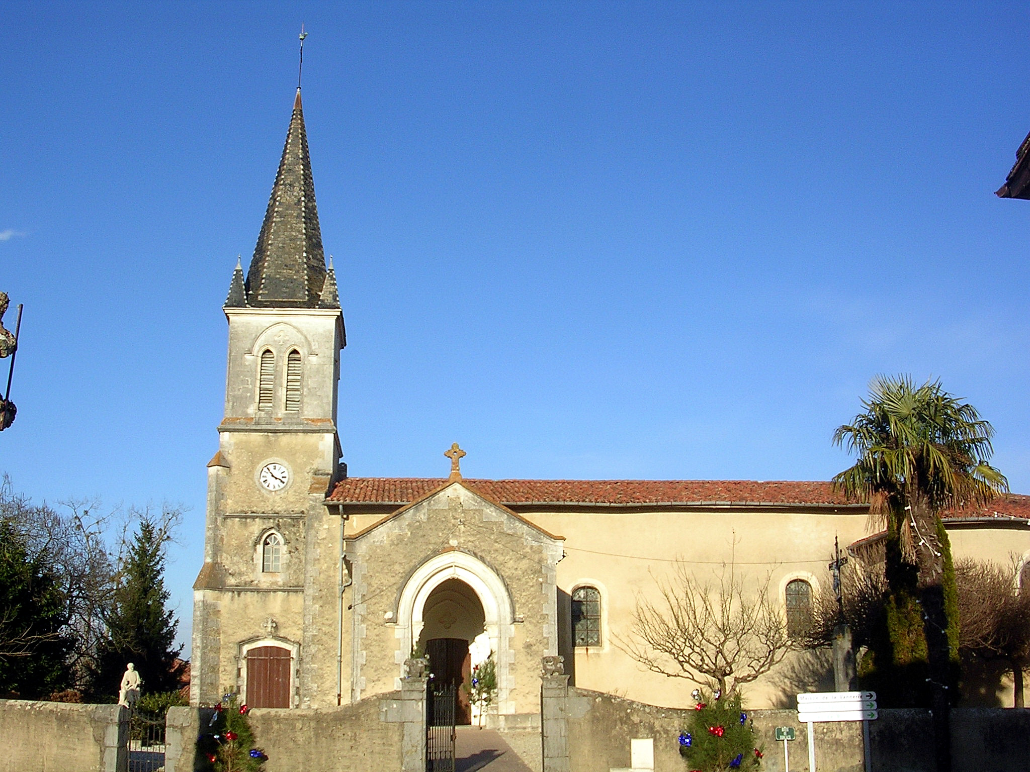 Église Sainte-Marie-Madeleine de Castelnau-Chalosse, dans le département des Landes, France.